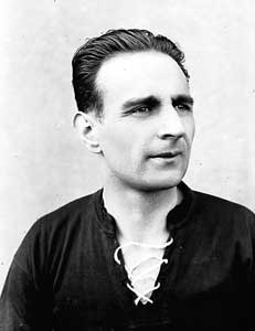 Photographie de Gyula Zsengellér